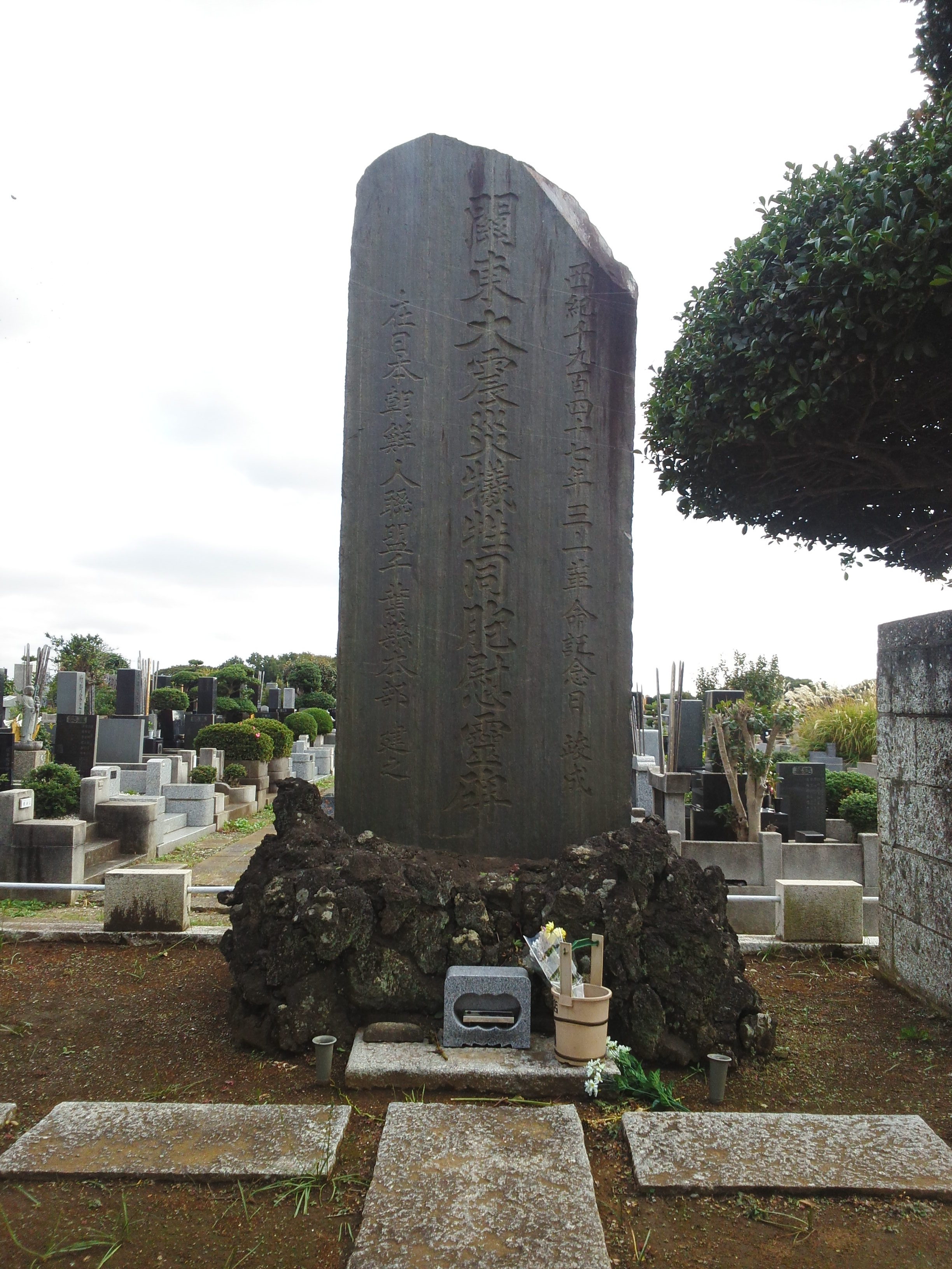 関東大震災犠牲同胞慰霊碑、1947年建立、1963年当地に移設。船橋市馬込霊園、2014年10月16日撮影。